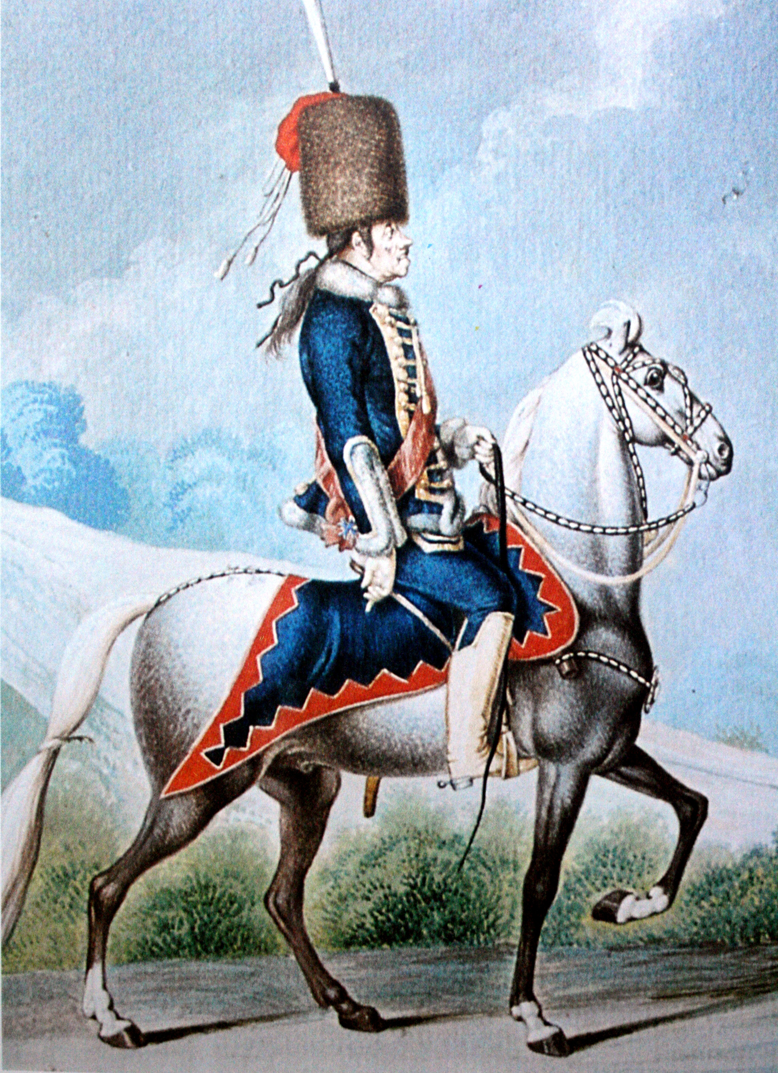 Hans Joachim von Zieten (1699-1786), in der Offiziersuniform des Regiments H 2. Porzellan-Malerei nach Chodowiecki, um 1775